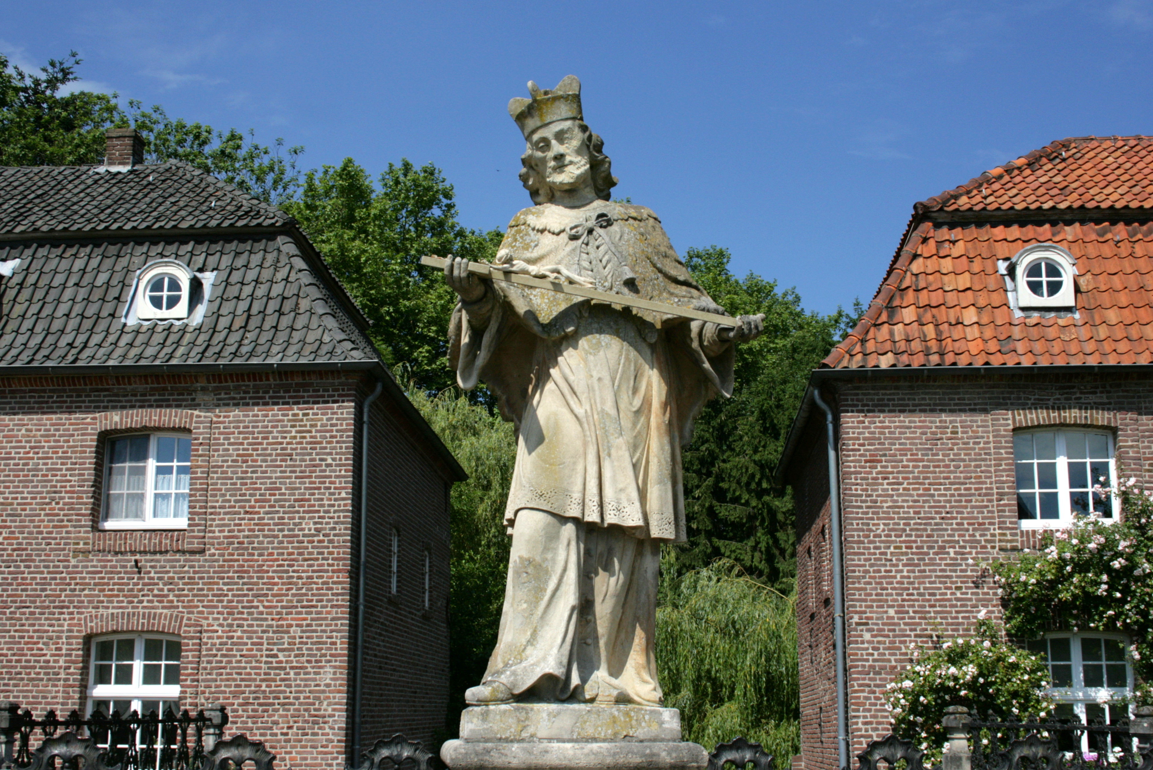 Nebengebäude der Wasserburg Anholt in Anholt, Isselburg